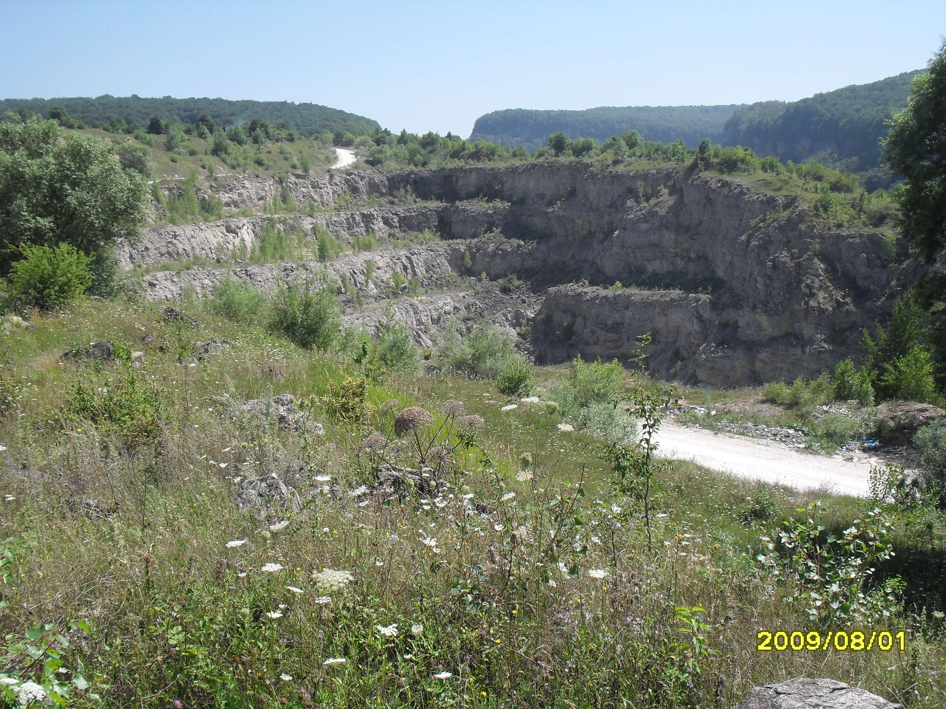 Cantera en Kamennomostski en la rpública de Adiguesia, Rusia